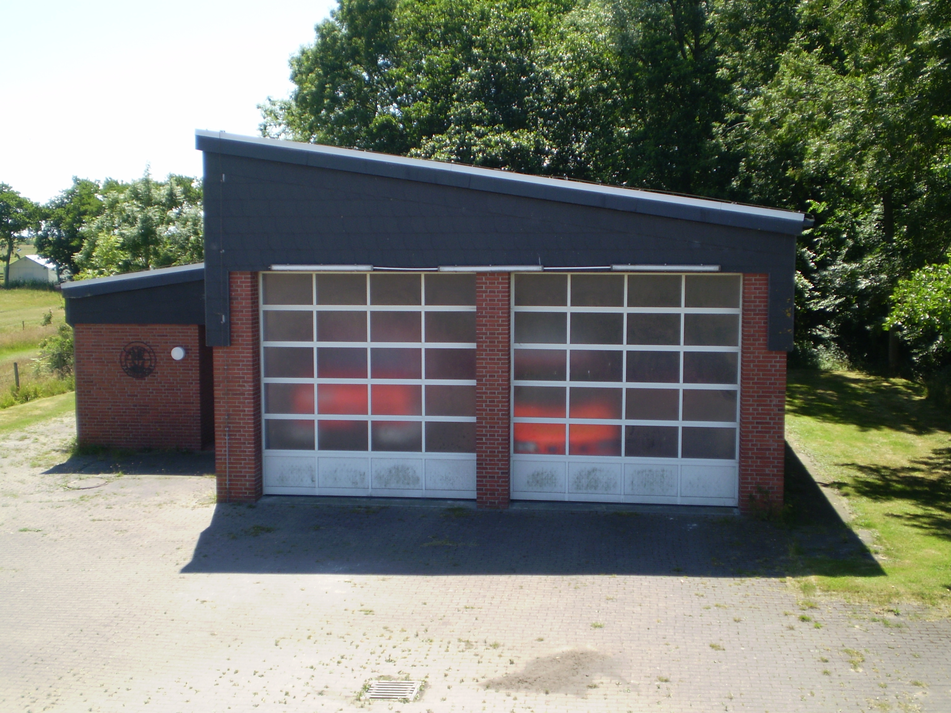 Gerätehaus der Freiwilligen Feuerwehr Neuwerk / Hamburg